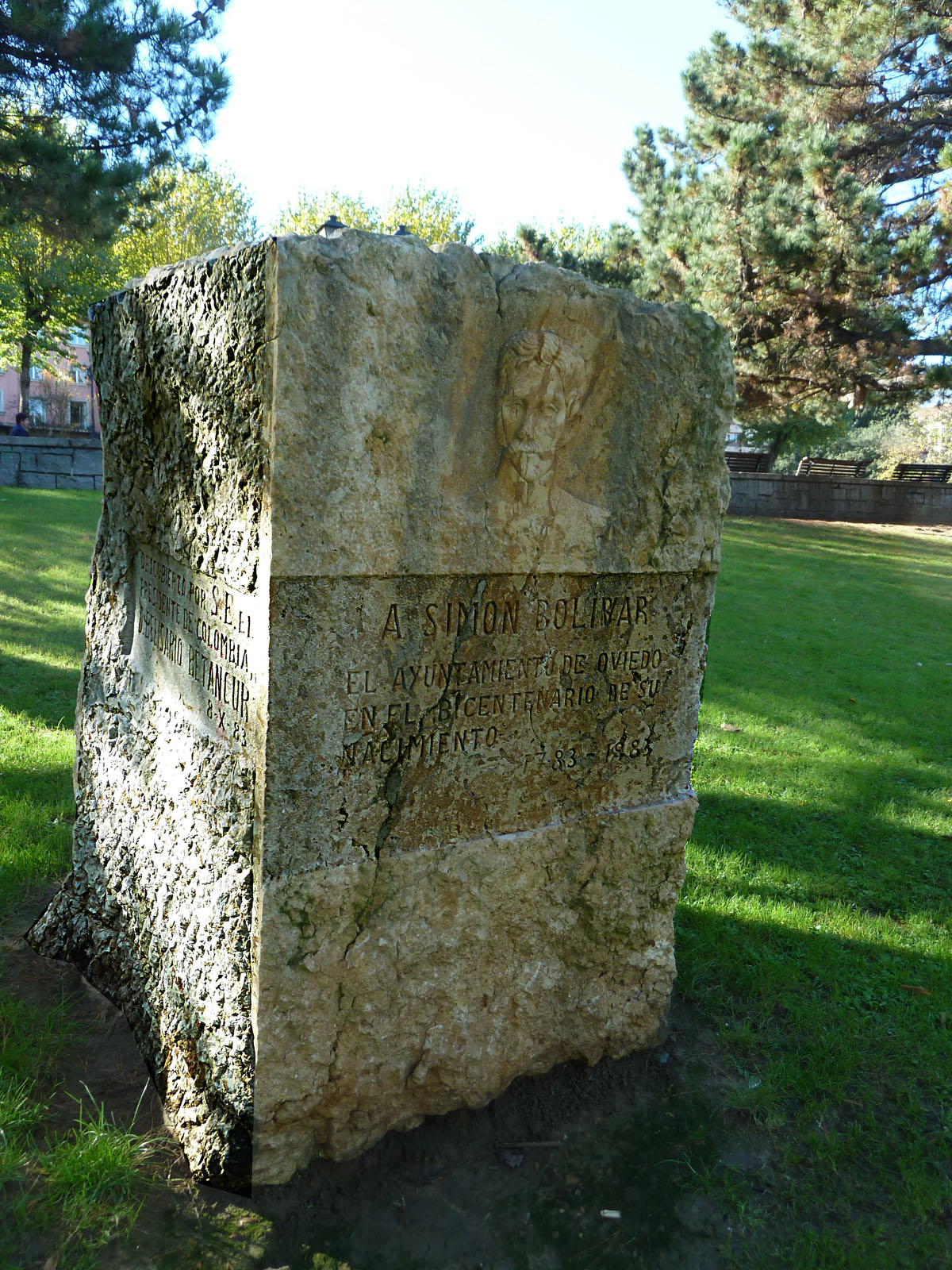 A Simón Bolivar. El Ayuntamiento de Oviedo en el Bicentenario de su nacimiento. 1783-1983.